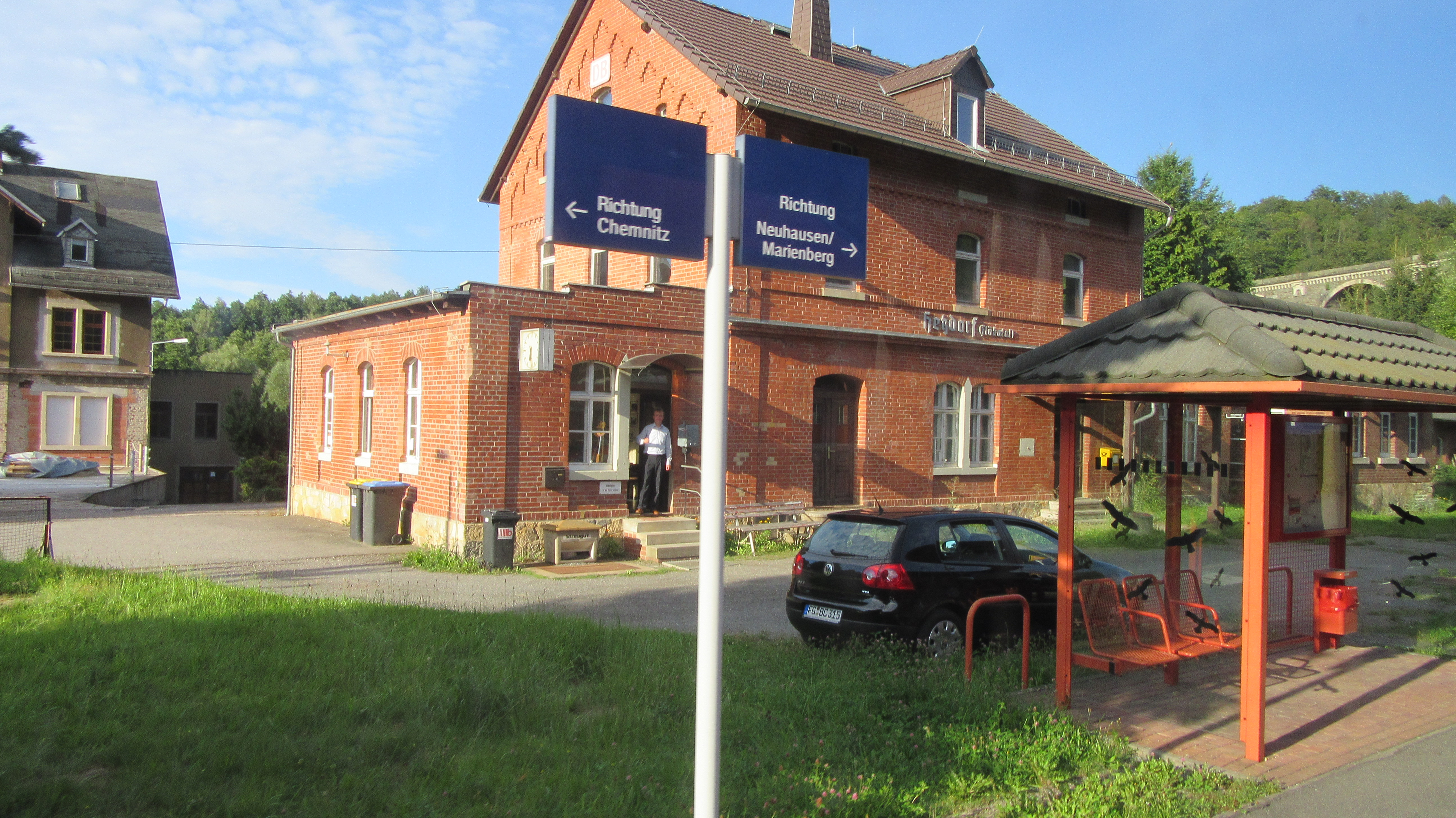 Empfangsgebäude des Bahnhofs Hetzdorf (Flöhatal), noch mit einem Fahrdienstleiter besetzt, am 13. August 2016